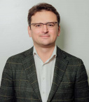 Дмитро Кулеба